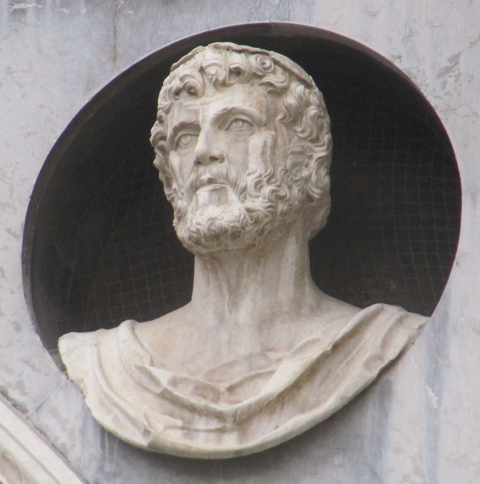 Busto di imperatore (Gasparo Cairano, 1500 circa, Palazzo della Loggia, Brescia)